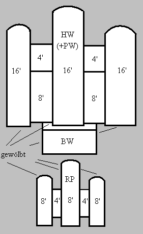 Prinzip des Neobarockprospekts der Marcussenorgel in Schleswig